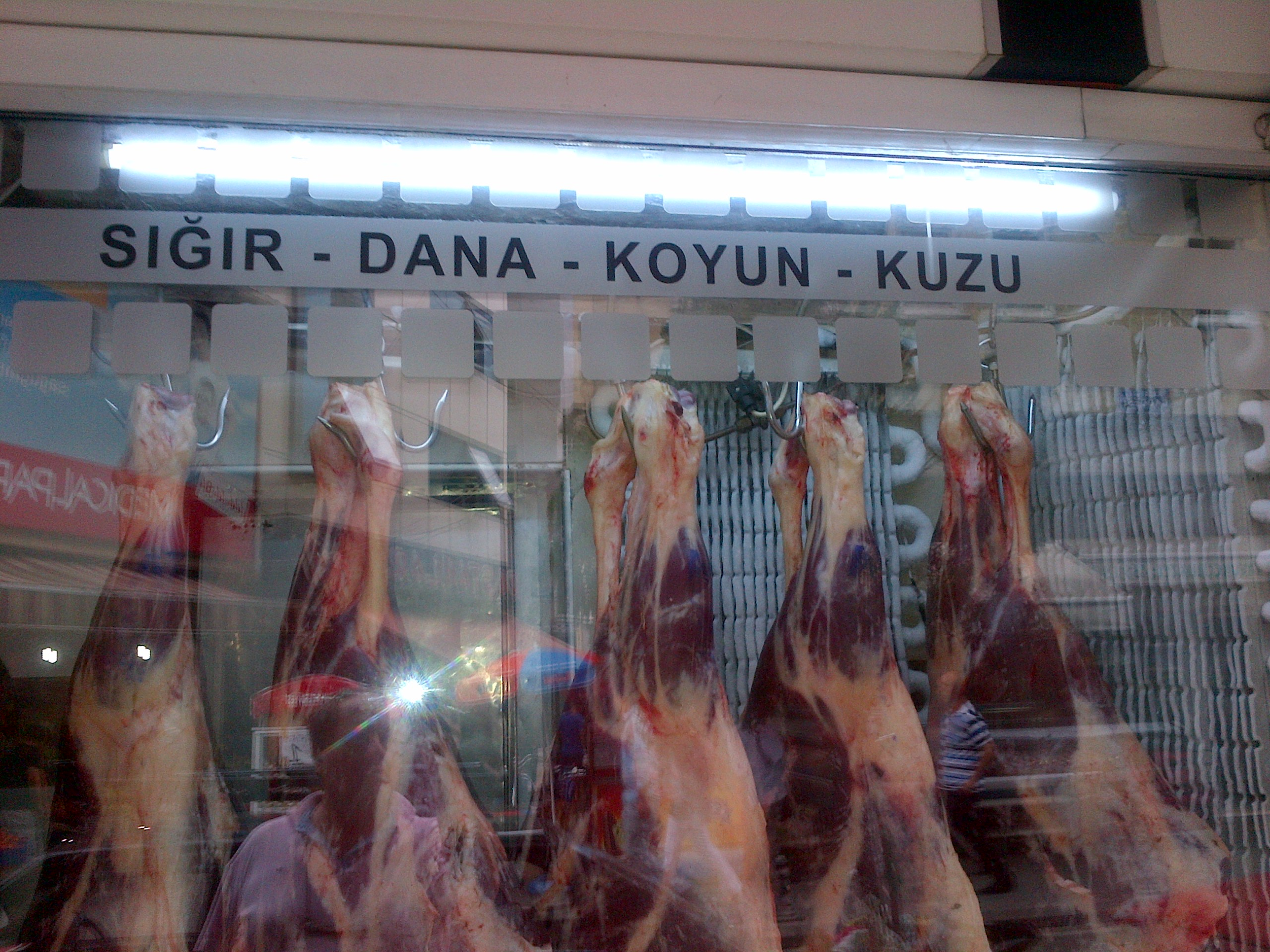 Carnes rojas en una carniceria de Samsun, Turquia.